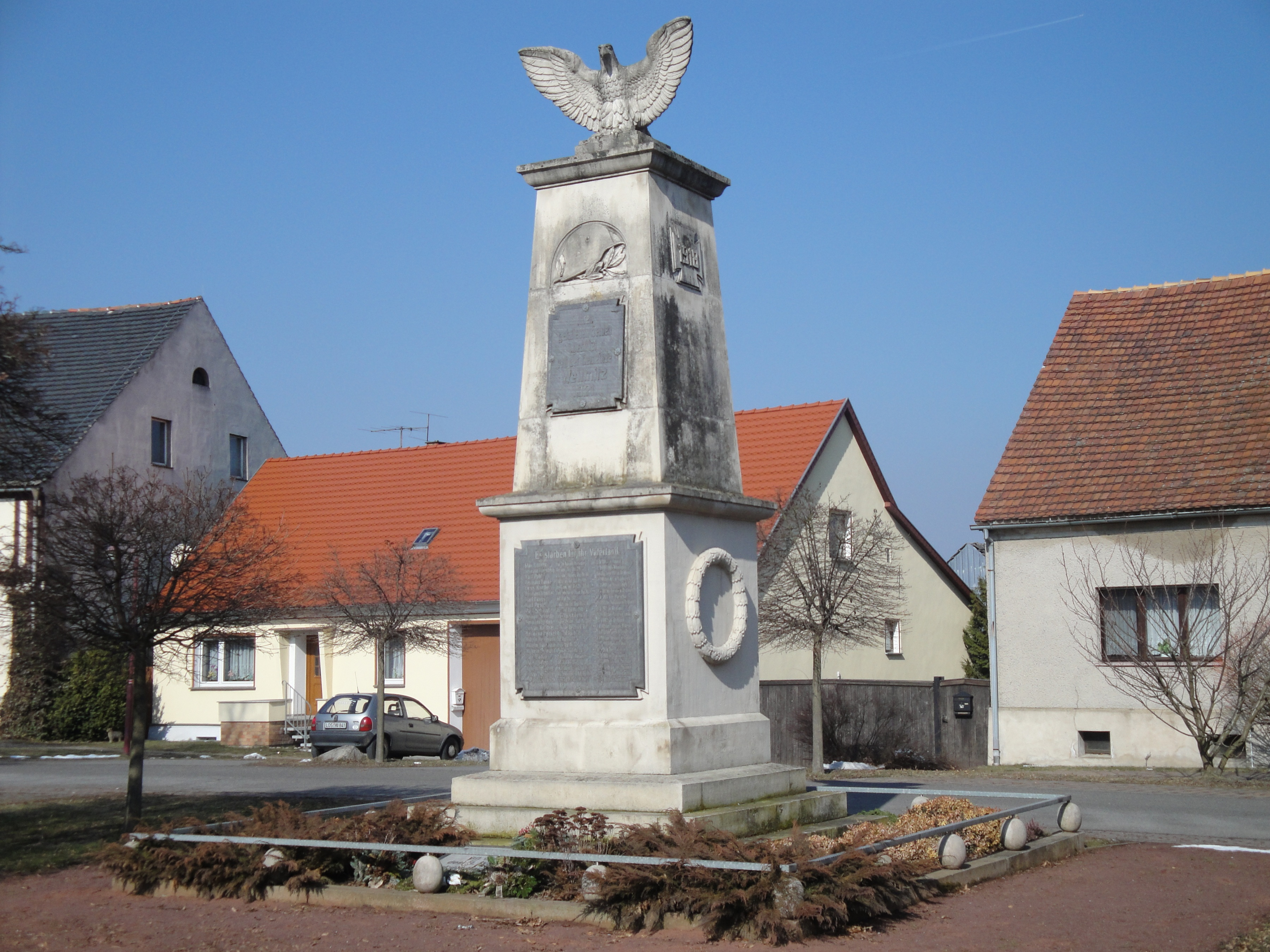 Kriegerdenkmal Wellmitz